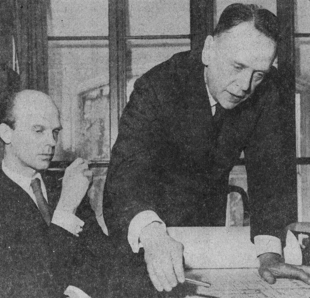 Riksbibliotekarie Uno Willers (t.v.) och arkitekt Carl Hampus Bergman över ritningarna till Kungliga Bibliotekets ombyggnad